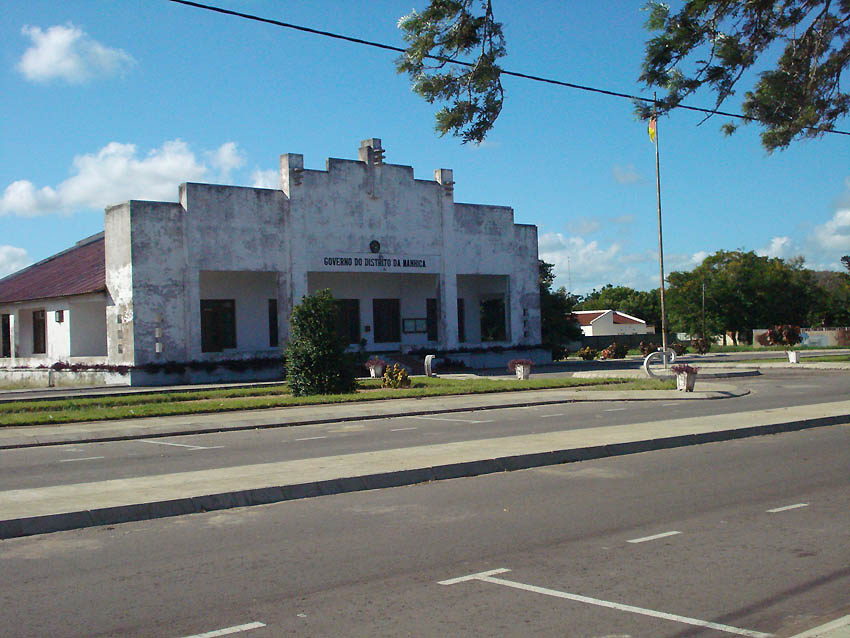 Edifício do Governo do Distrito da Manhiça, situado na vila da Manhiça, Moçambique